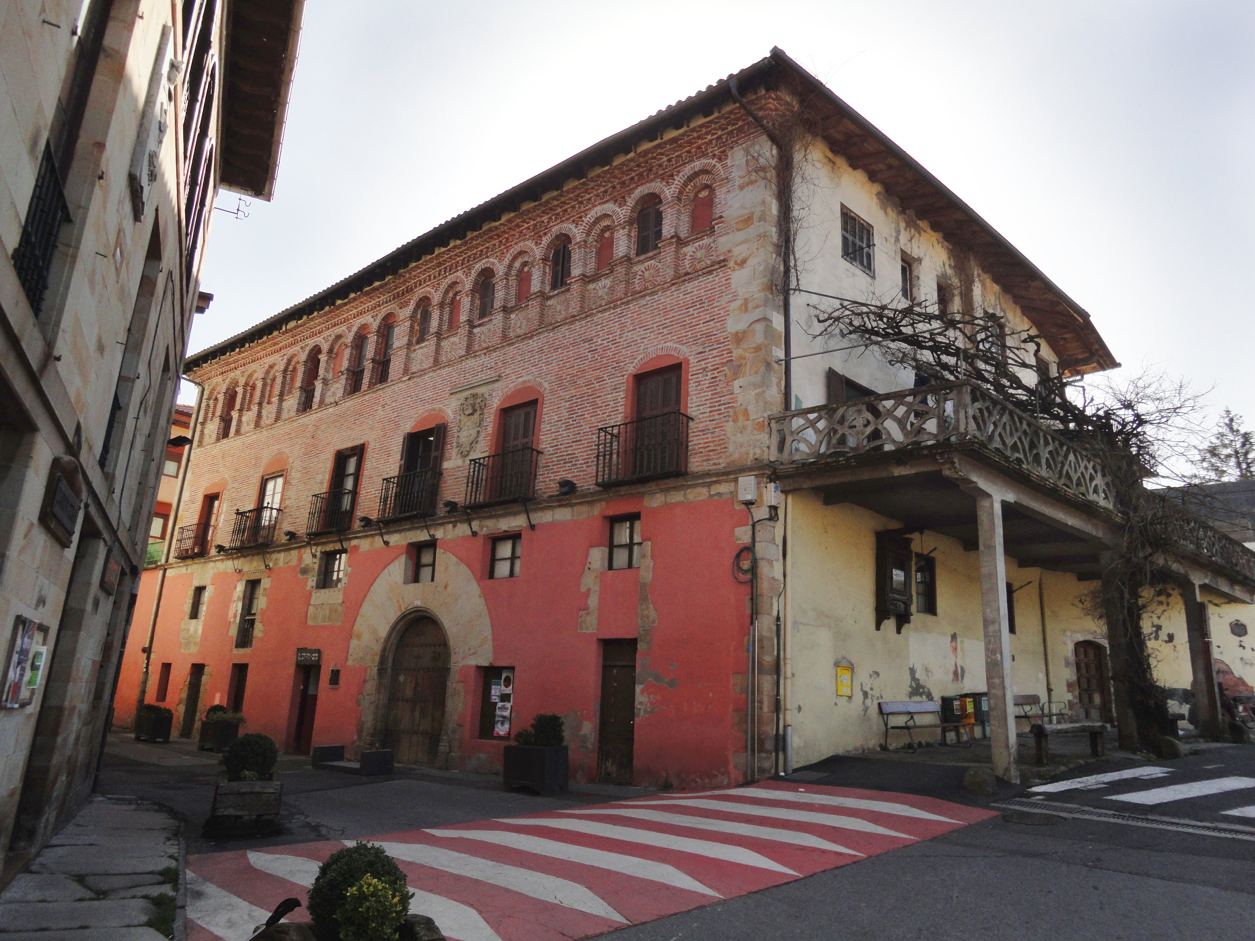 Arrue jauregia - Segura